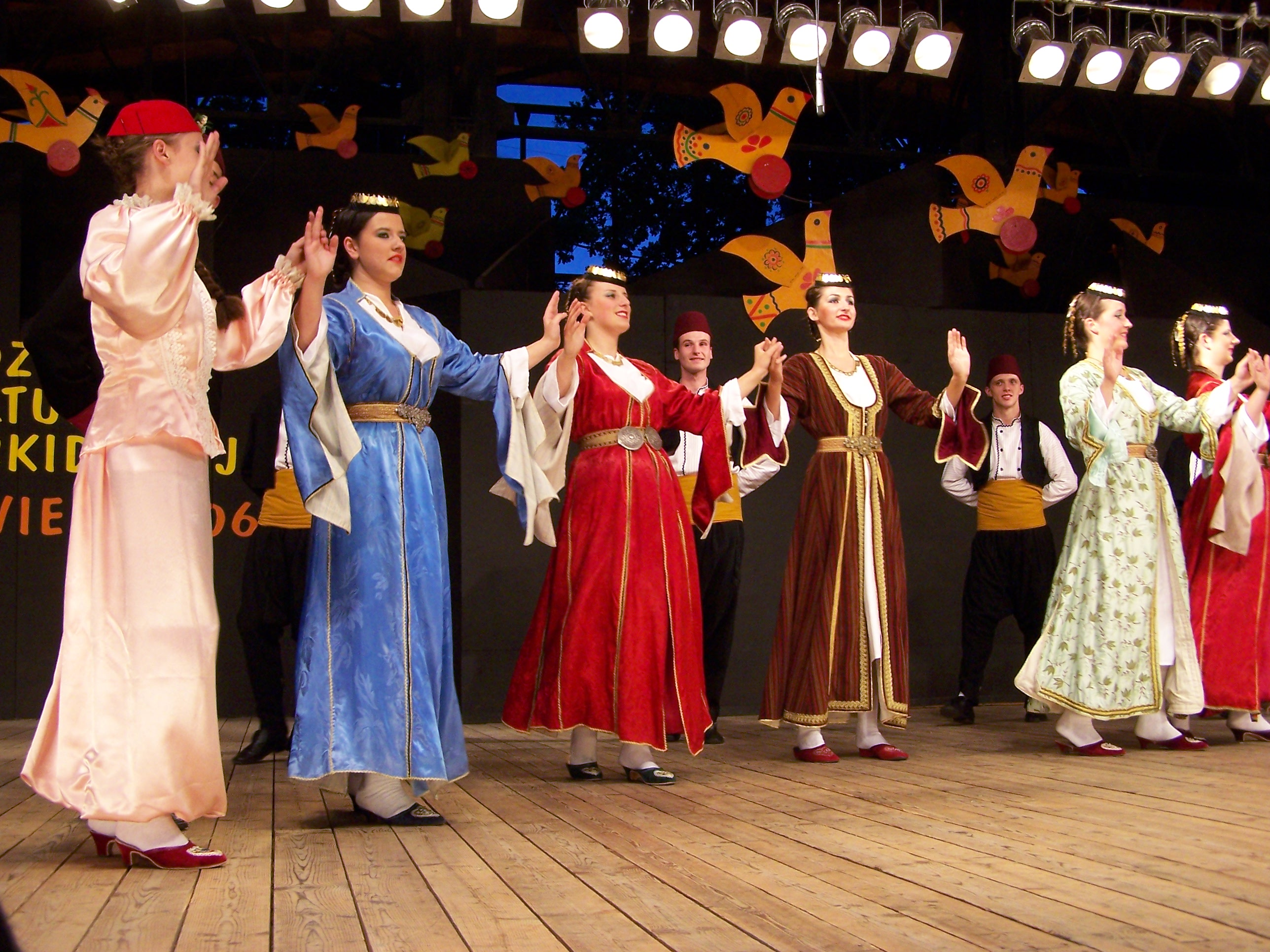 Występ zespołu Seljo z Sarajewa (Bośnia i Hercegowina) podczas 43. Tygodnia Kultury Beskidzkiej w Żywcu.